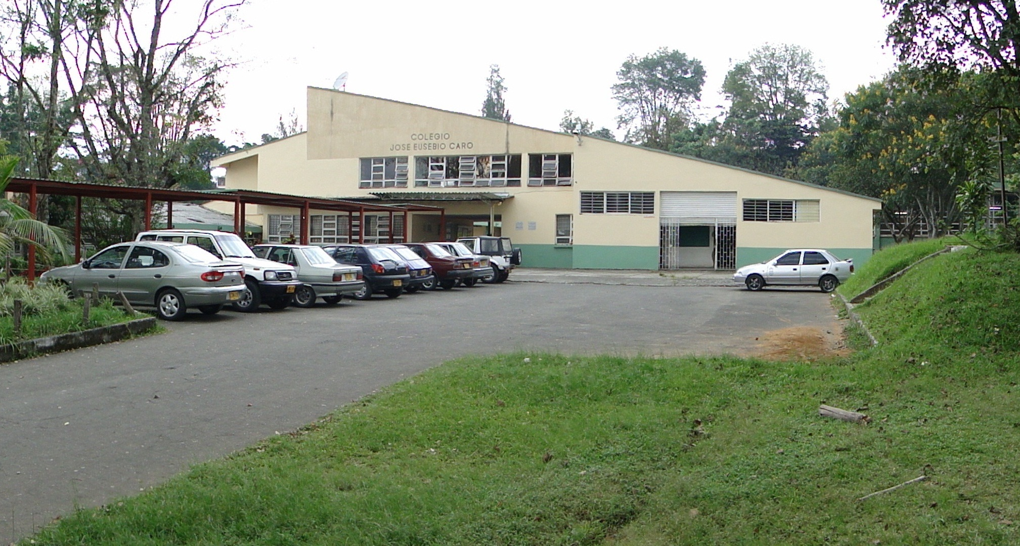 A partir del 21 de septiembre de 1.972 la Sede Principal ocupa las Instalaciones ubicadas en el Barrio Chuni, su radio de influencia comprende las comunas 7, 8 y 9, las cuales se extienden sobre la periferia sur occidente de la ciudad de Popayán.